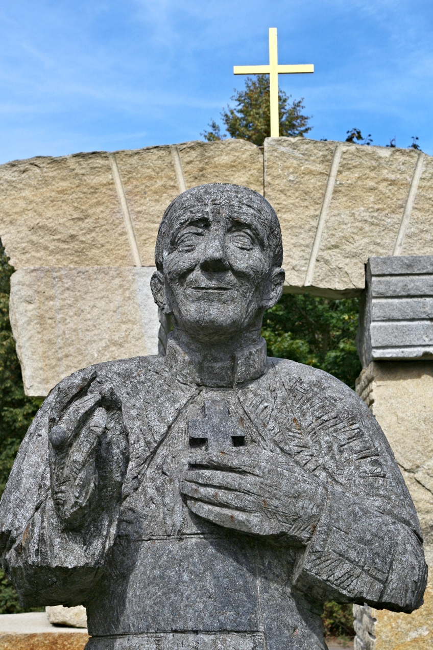 Praha-Dejvice socha kardinála Berana